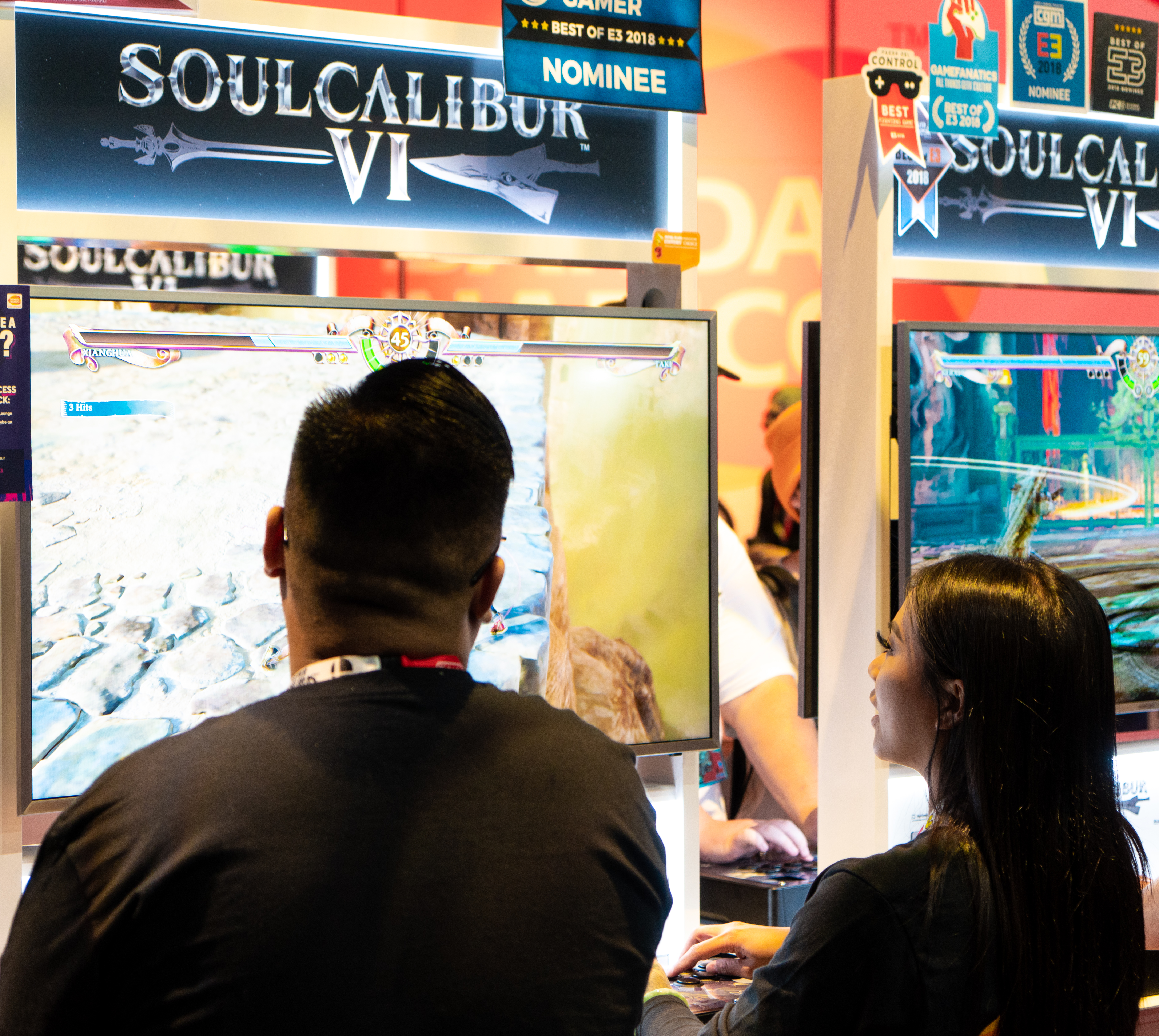 E3 2018